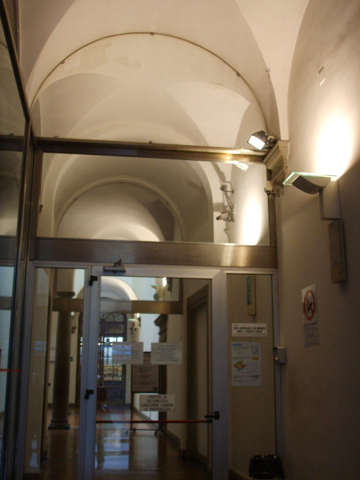 Palazzo bagnesi 03 atrio